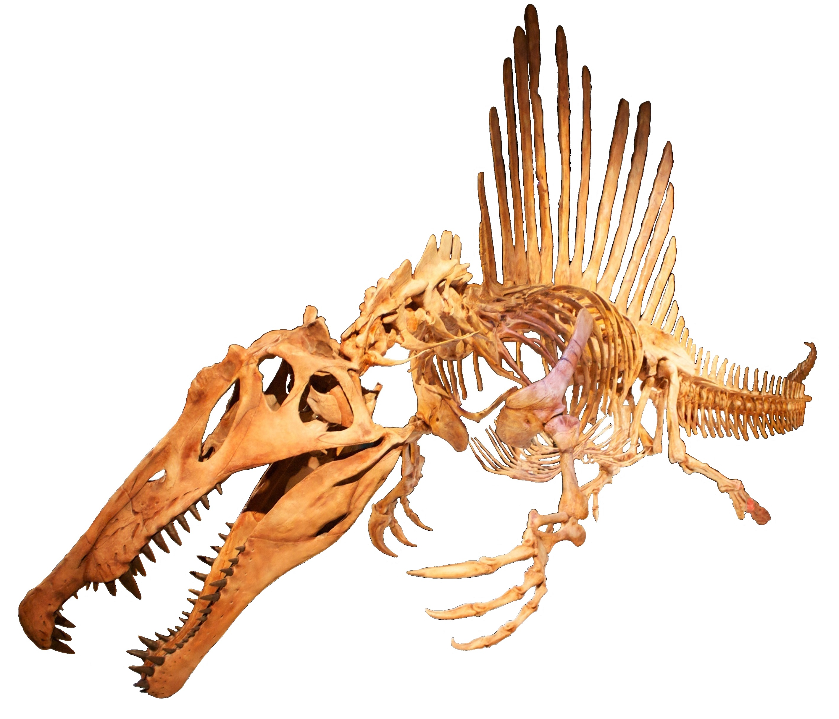 Spinosaurus